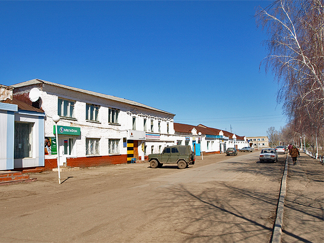 Духовницкое, ул. Ленина